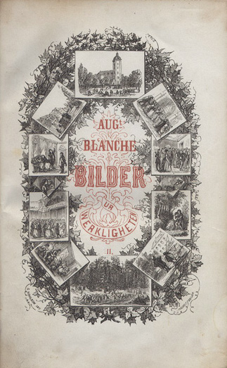 Bilder ur verkligheten / af August Blanche. Title page.